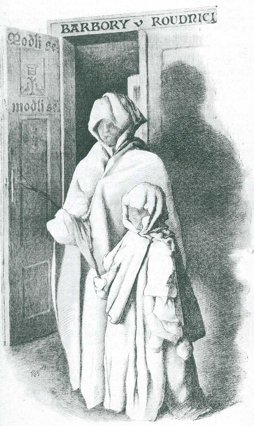 Барбурки